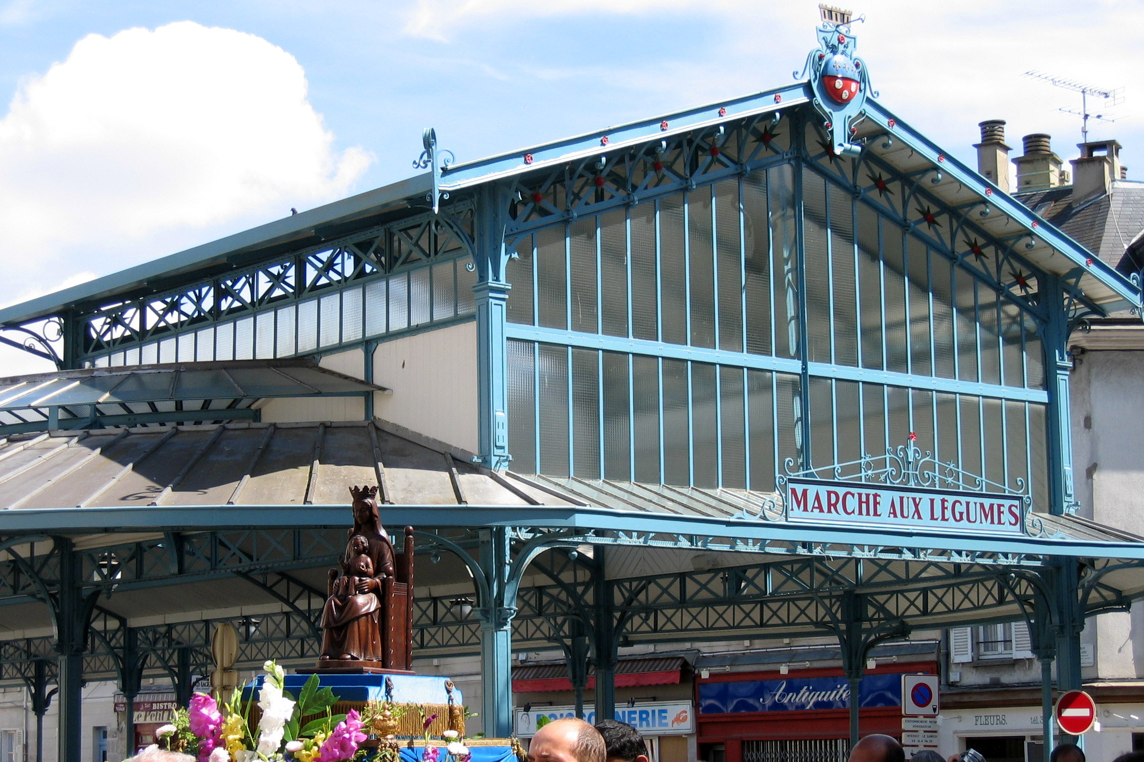 Marché aux légumes, place Billard, Chartres, Eure-et-Loir (France). Procession pour l'Assomption de Marie (15 août).